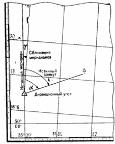 Дырэкцыйны вугал і збліжэнне мерыдыянаў